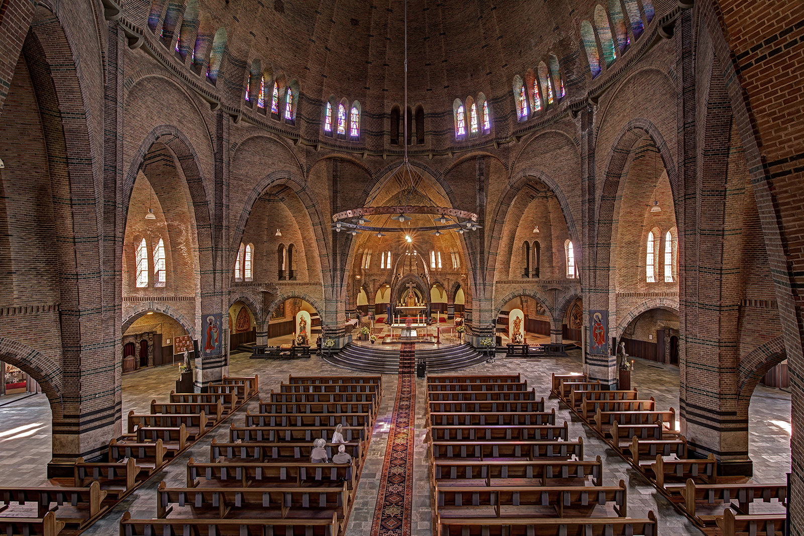 Architectuur van de binnenzijde van de Sint Jan Waalwijk